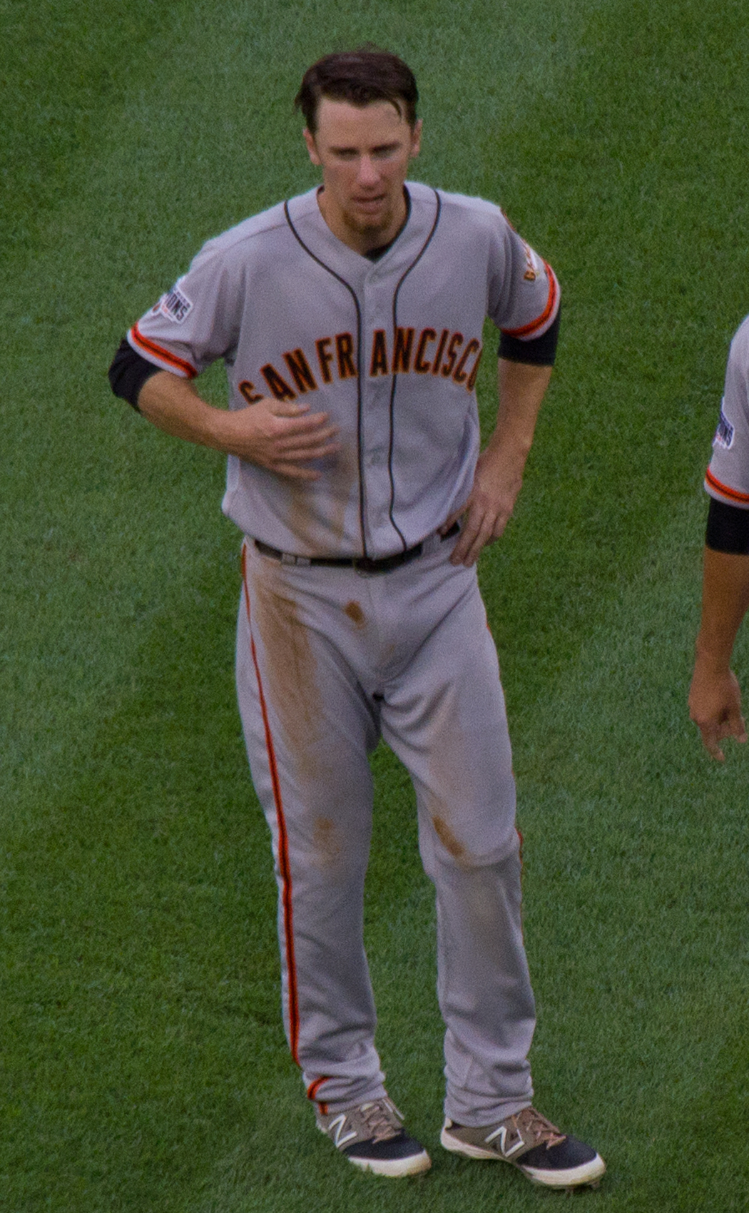 Matt Duffy